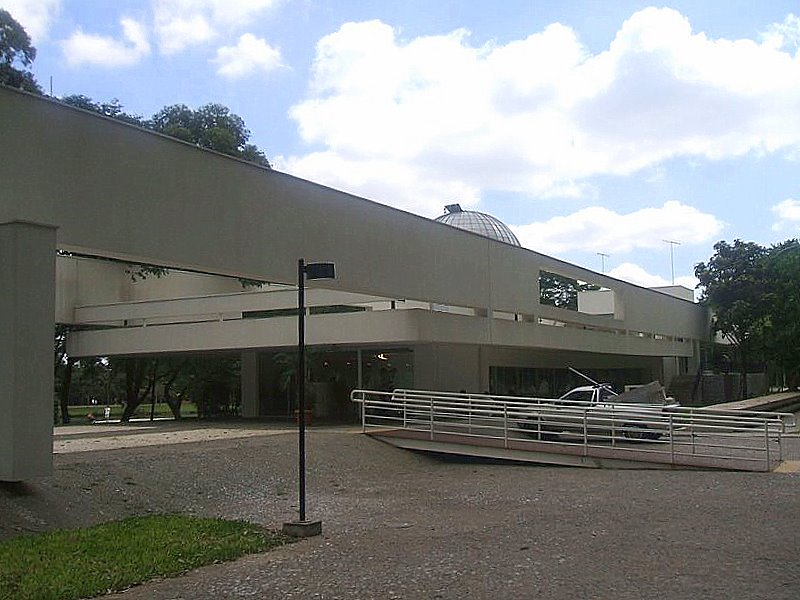 Escola Municipal de Astrofísica, no Parque do Ibirapuera, em São Paulo, Brasil.